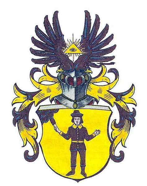 Wappen Jauch tingiert